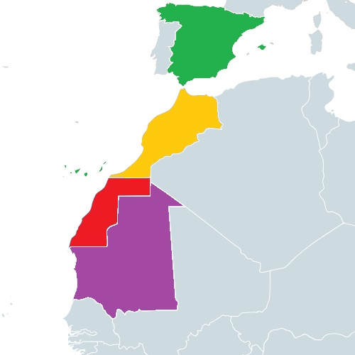 Acuerdo Tripartito de Madrid Rojo: Sahara español Verde: España Amarillo: Marruecos Morado: Mauritania